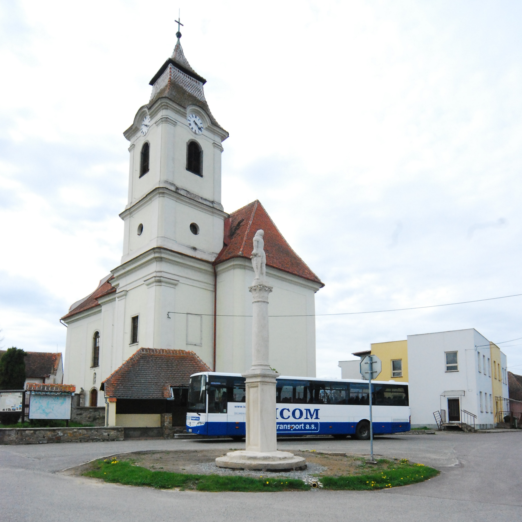 Pfarrkirche von Vratěnín/Fratting mit Pranger